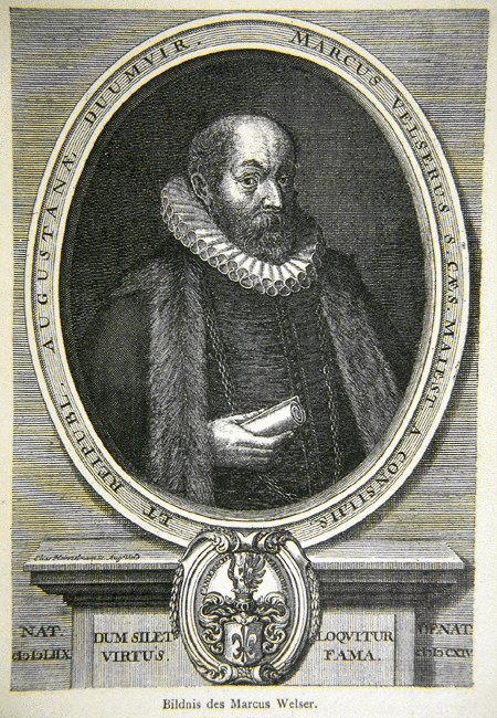 Der Augsburger Groß-Kaufmann und Bürgermeister Markus Welser (1558-1614)